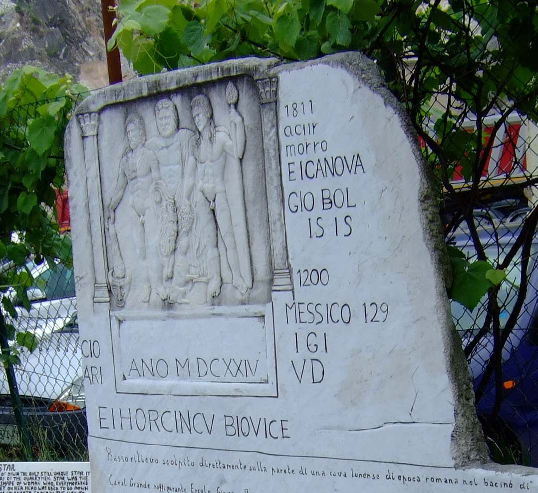 Calco di un bassorilievo di epoca romana (Carrara) – Italia.